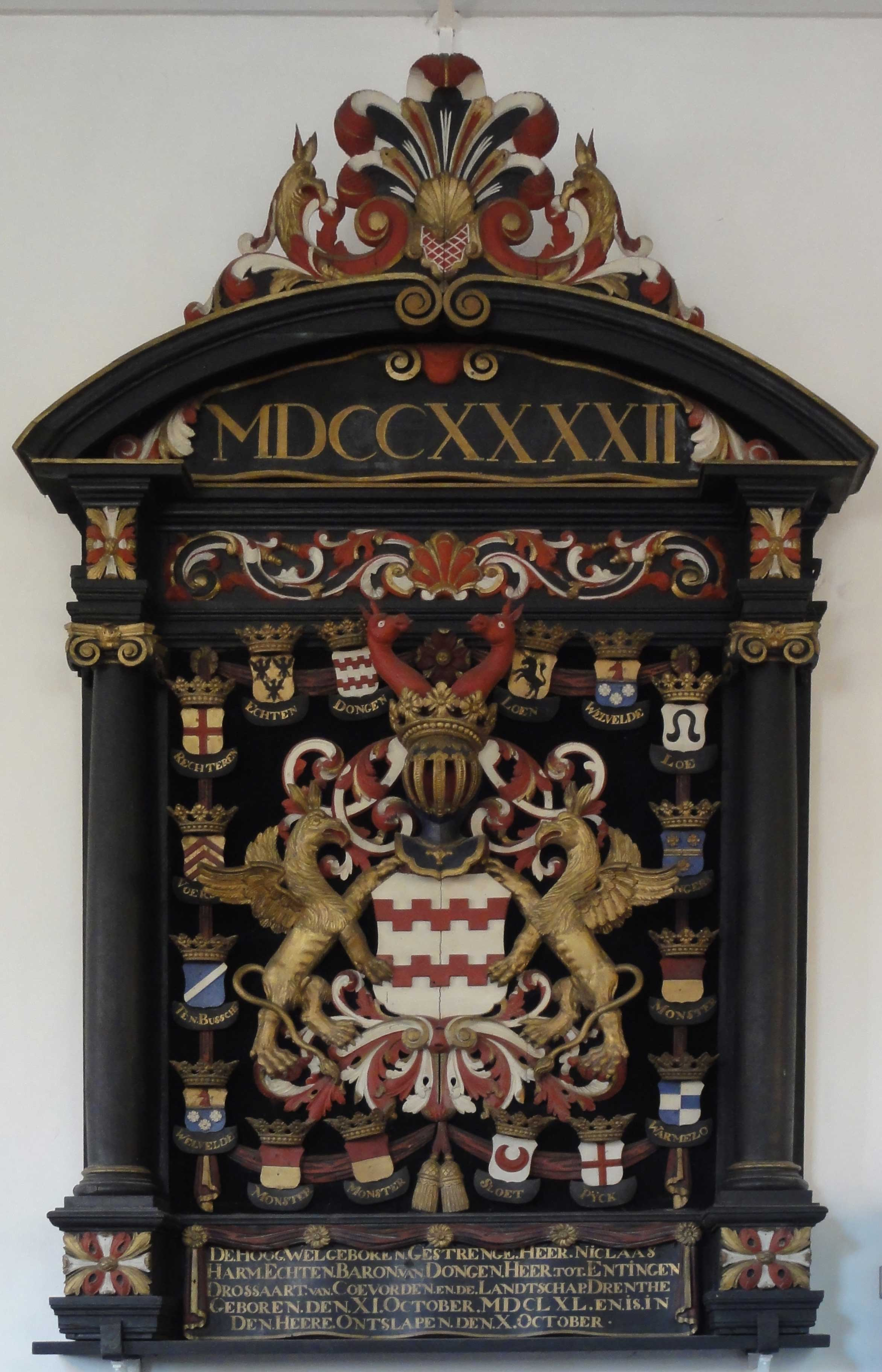 foto van het rouwbord van Nicolaas Harmen van Echten (1690-1742), gedeputeerde en drost van Drenthe, in de kerk van Gieten